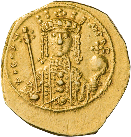 Феодора (1055—1056). Номисма тетартерон. Константинополь. Реверс. Погрудный портрет Феодоры, в фас; на голове корона с крестом; в правой руке держит скипетр, в левой — державу с крестом.